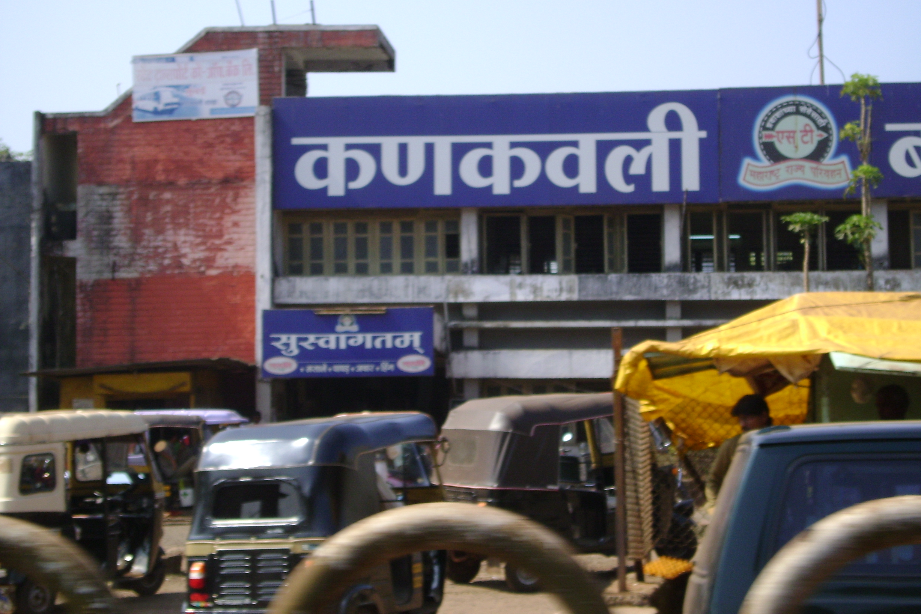 Kankavli Bus Depot